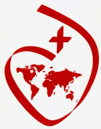 Конгрегация Святейшего Сердца Иисуса